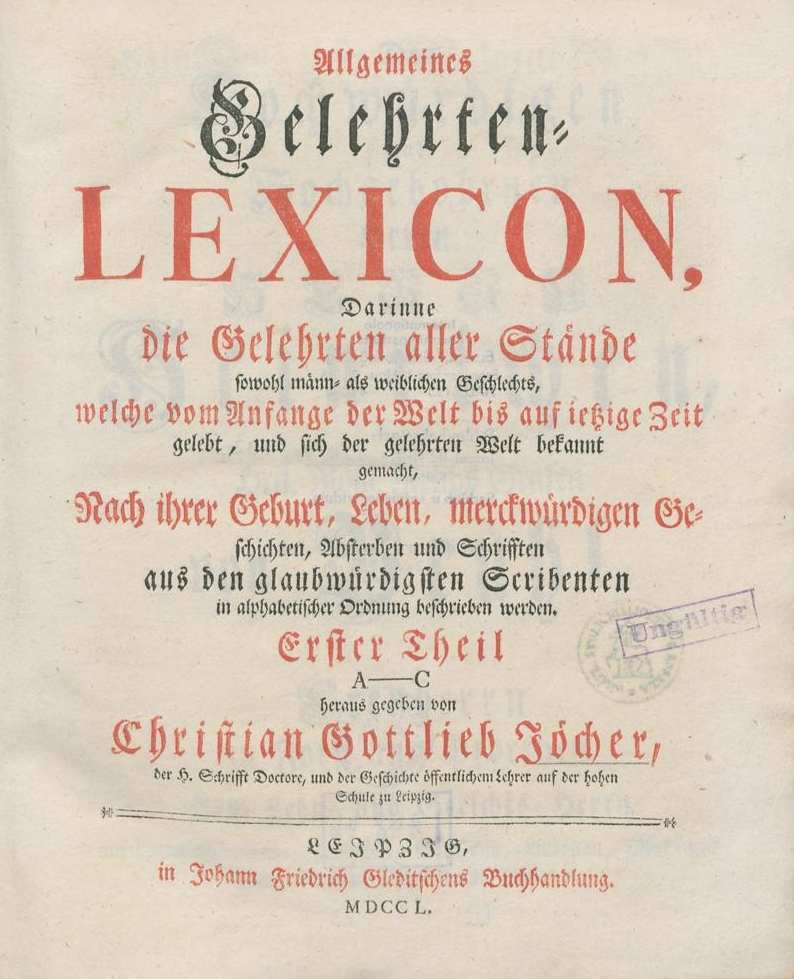 Allgemeines Gelehrten-Lexicon, Band 1, Titelblatt